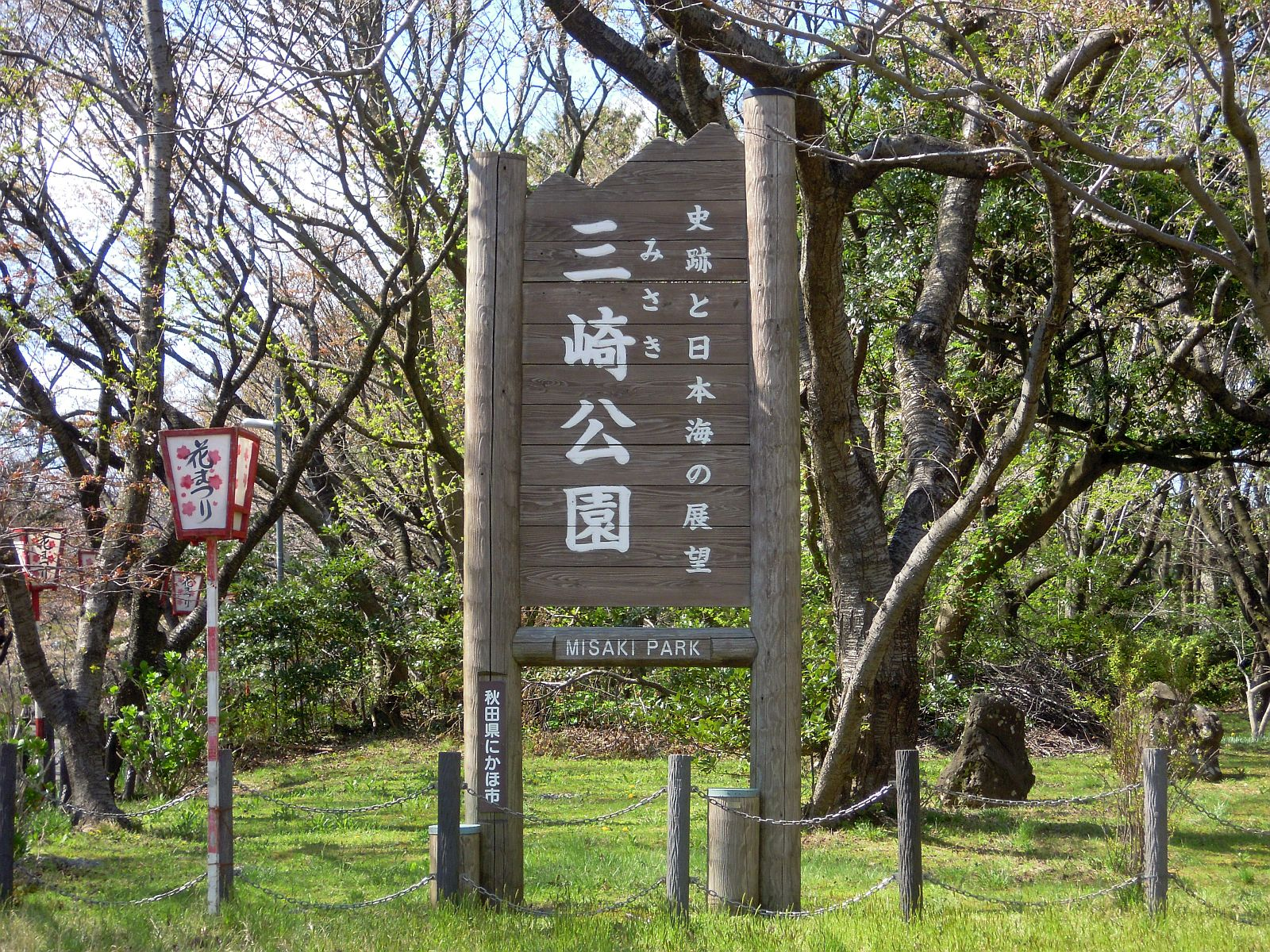 秋田県にかほ市と山形県飽海郡遊佐町に跨る三崎公園の入口看板（看板の所在地は、にかほ市）